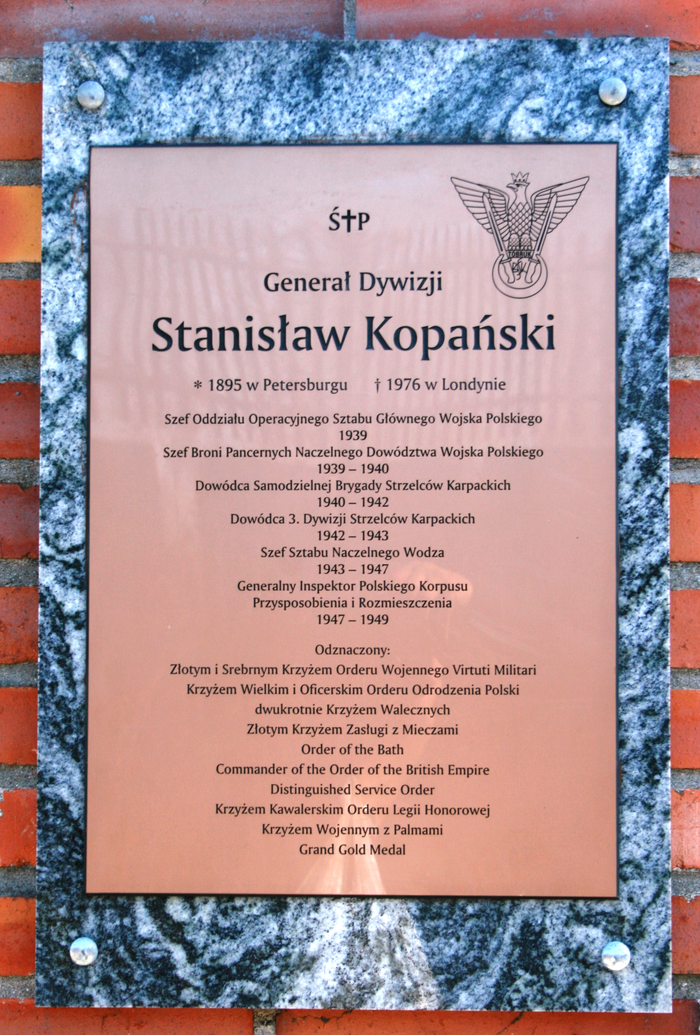 Kwatera Pierwszej Samodzielnej Brygady Spadochronowej na Powązkach Wojskowych w Warszawie